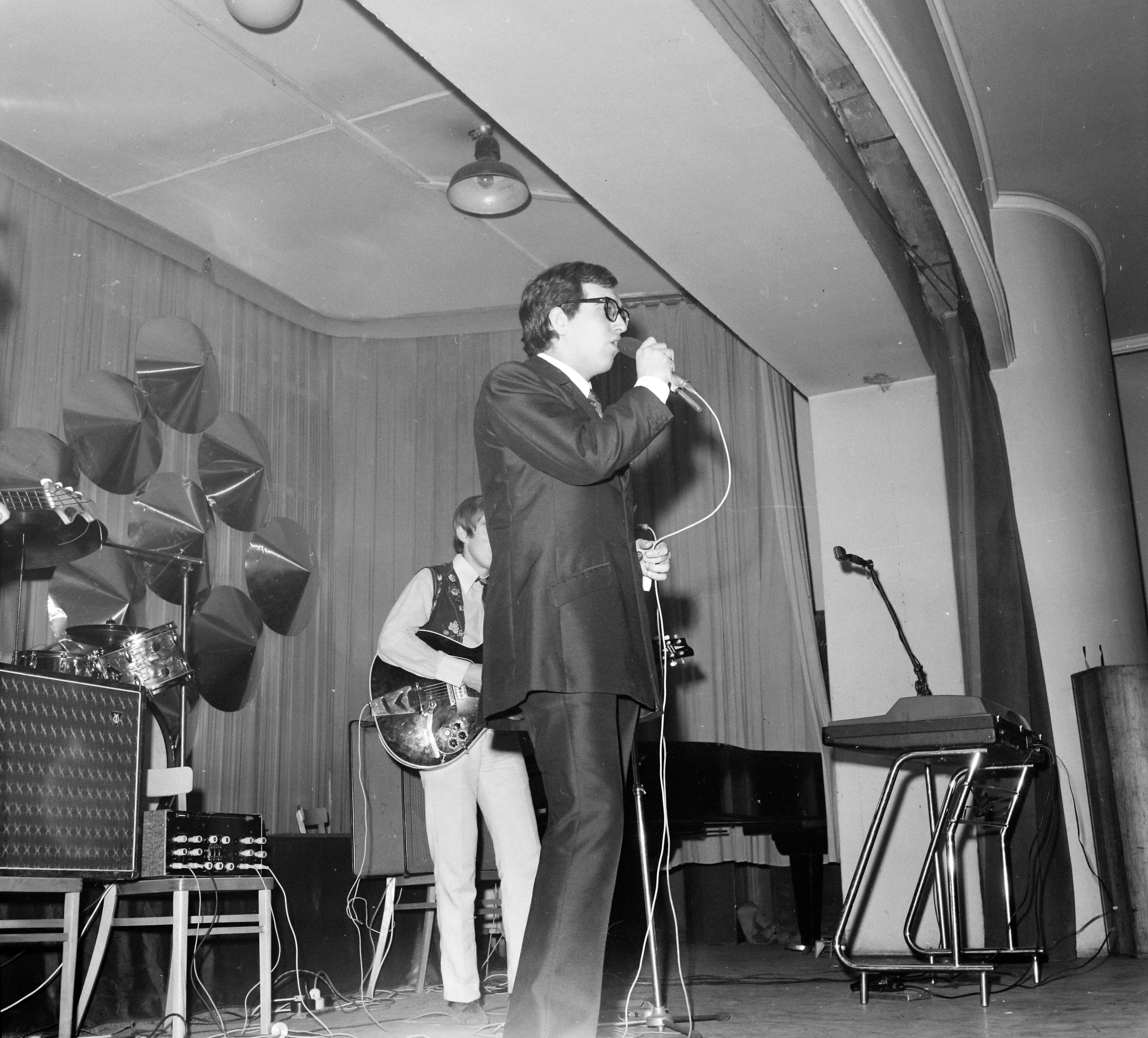 UVATERV? zenés rendezvény Máté Péter és a Főnix együttes. Location: Hungary Title: Máté Péter és a Főnix együttes.